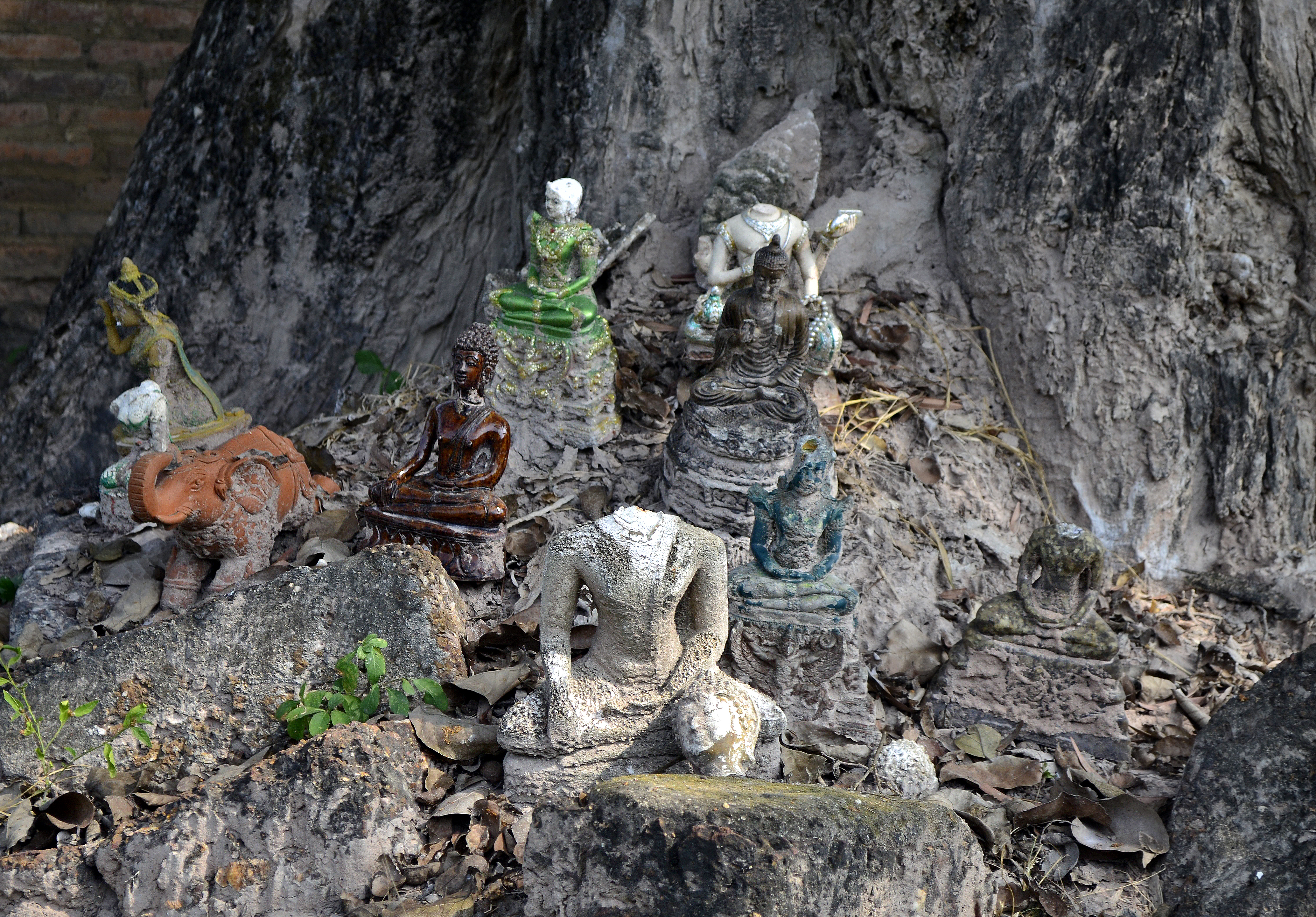 Wat Sri Sawai im Geschichtspark Sukhothai